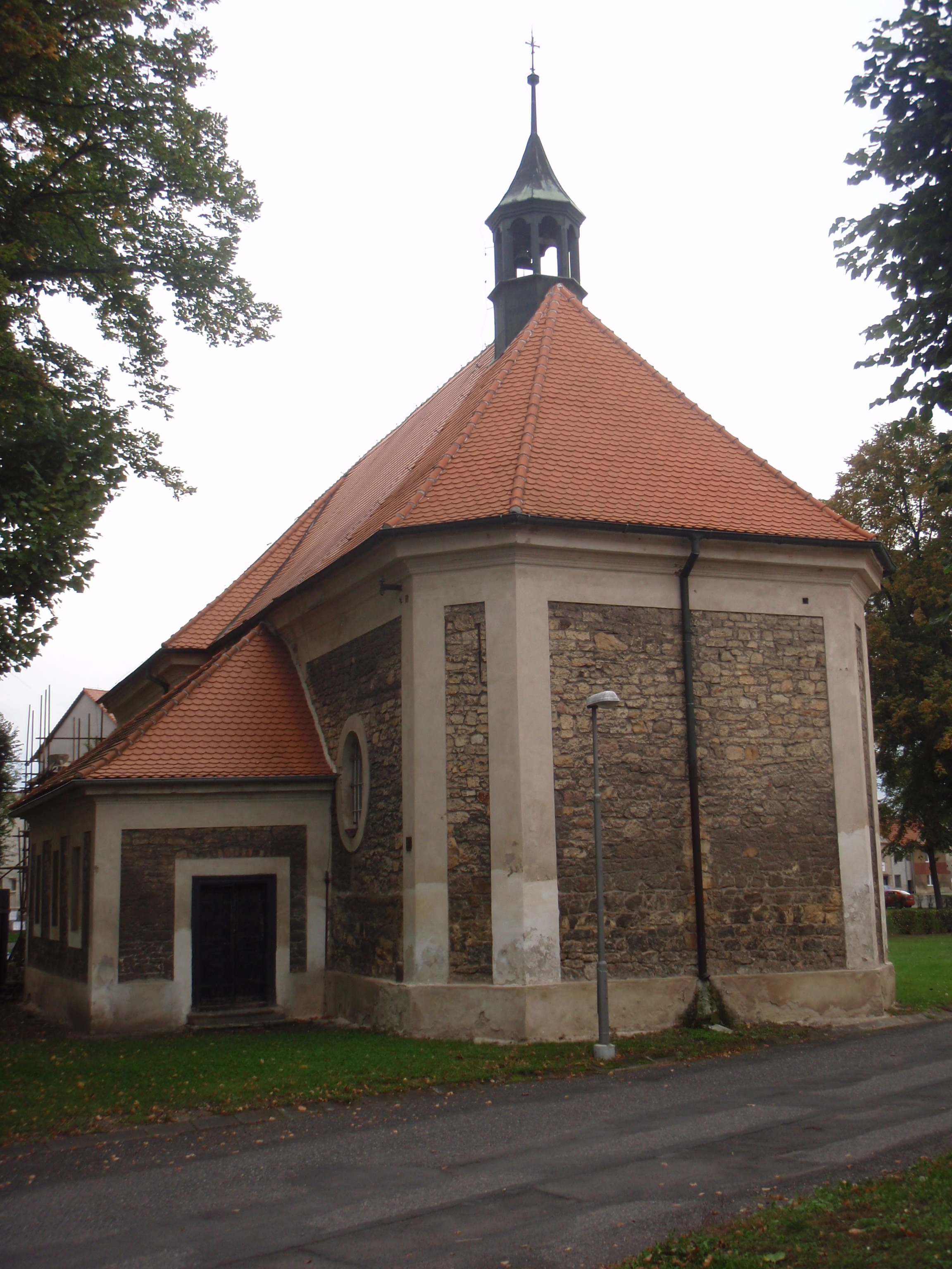 Kostel sv. Šimona a Judy, farní (Lenešice), Lenešice, zadní část, pohled od fary